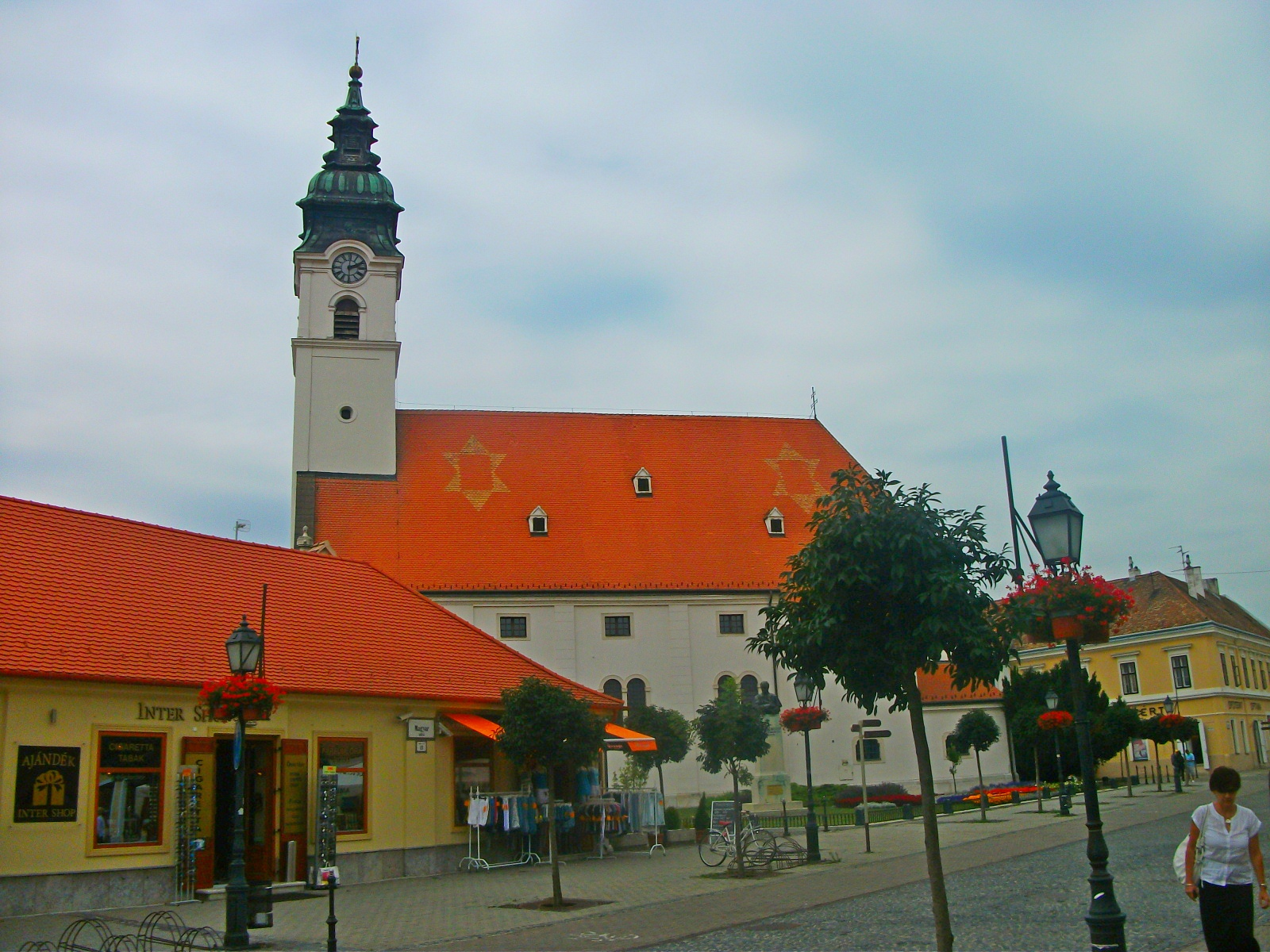 Az Óvári Szűz Mária Királynő és Szent Gotthárd templom, Római katolikus plébániatemplom azonosító 4580 (törzsszám 3072). középkori eredetű, barokk, 17-18. sz. Tornya 1820-ban épült. - Győr-Moson-Sopron , Mosonmagyaróvár, Szent László tér 1 .